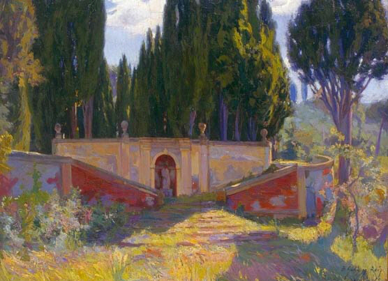 Baldomer Gili i Roig, 1900 Oli sobre tela 98 x 130,5 cm MAMLL - 0206